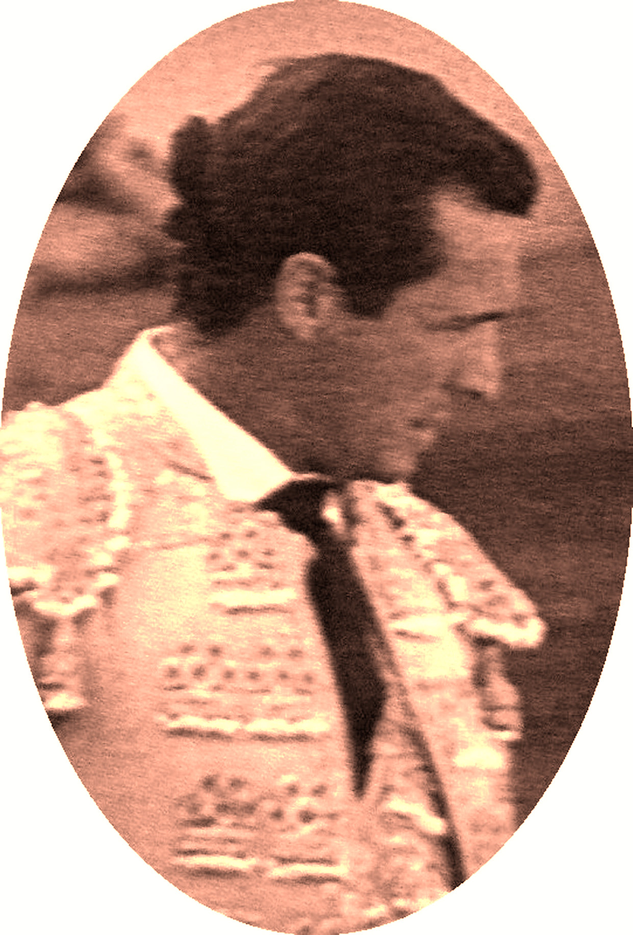 Manzanares2.JPG